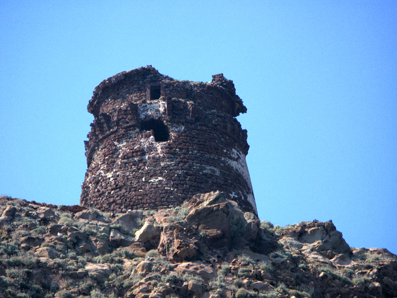 Torre dello Zenobito — Cala Rossa, Capraia Isola. Within the Arcipelago Toscano National Park.